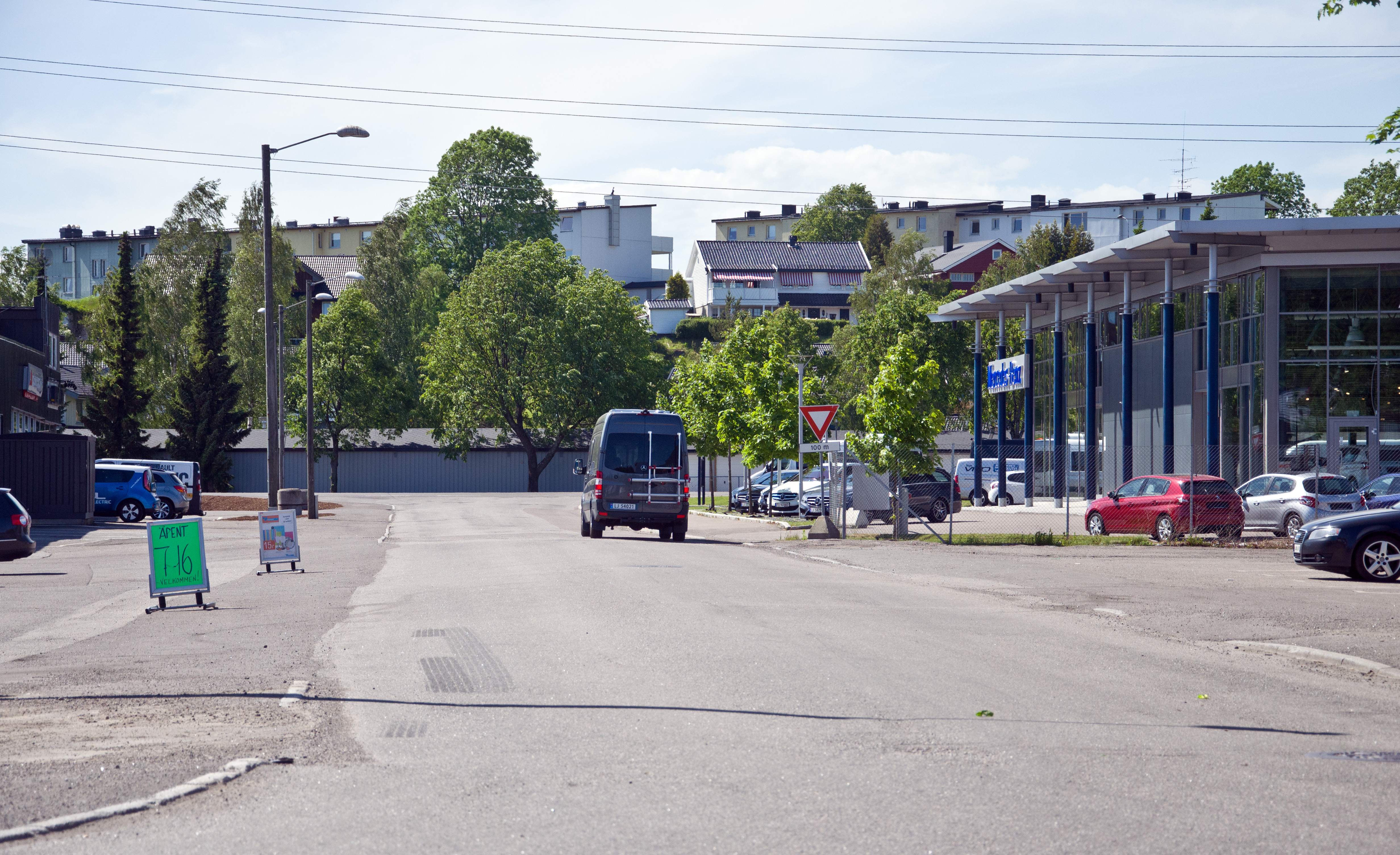 Malergaten, Tønsberg